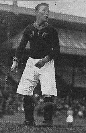 Pära Kaufeldt (1902-1956)